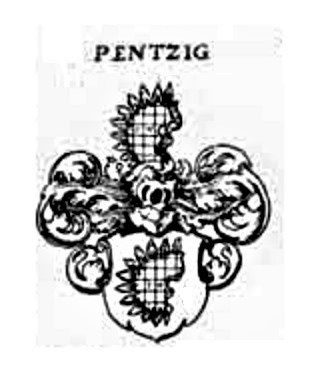 Herb von Pentzig